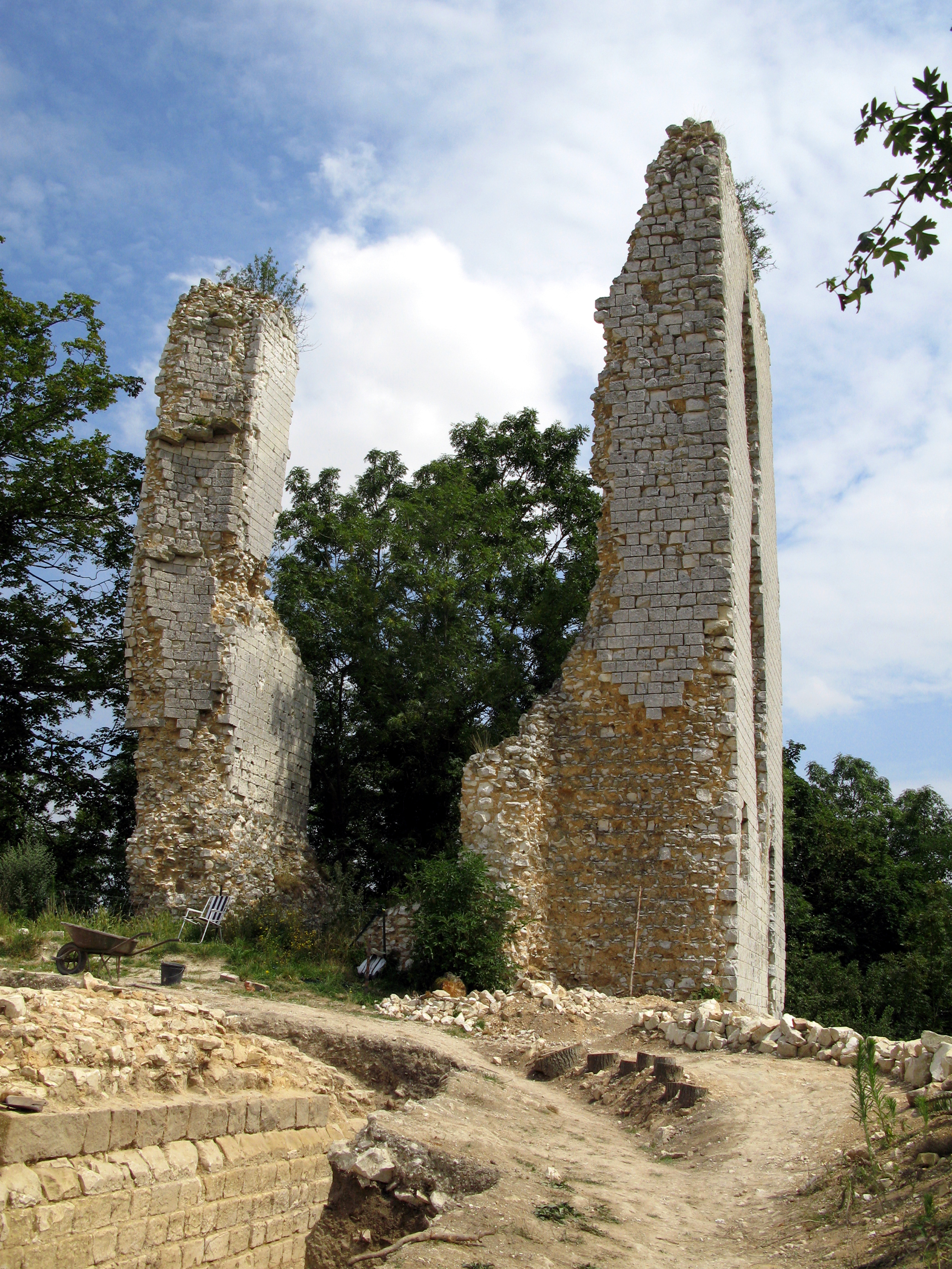 Boves (Somme, France) - Vue lors de la visite guidée des fouilles du samedi 26 juillet 2008 après-midi. Dès l'arrivée sur le site, on aperçoit (outre les vestiges d'une tour), une muraille tout fraîchement dégagée lors de la campagne de l'été 2008. L'appareillage de pierre est régulier et soigné.